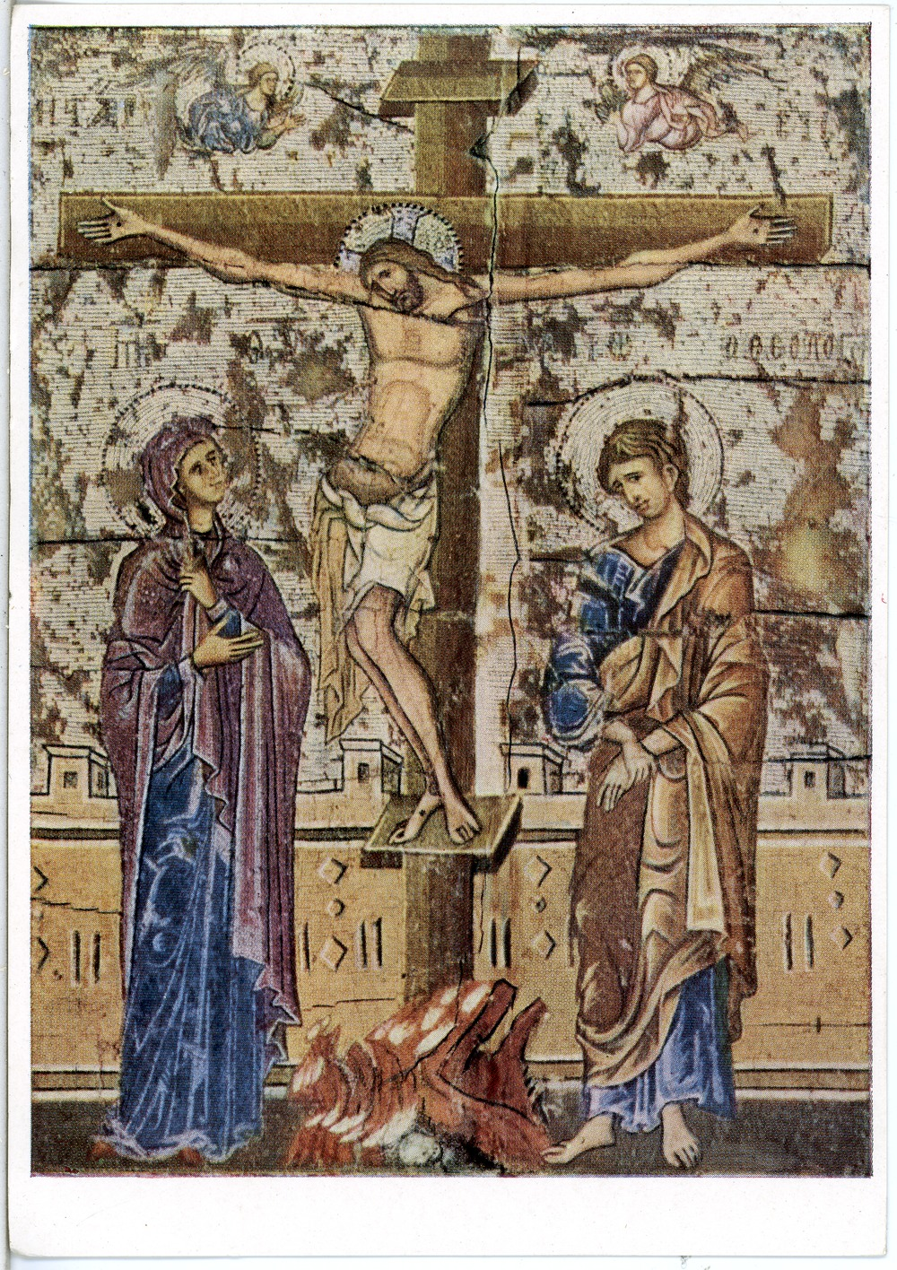 Berlin; Staatliche Museen, Frühchristlich-byzantinische Sammlung This postcard is from publisher Brück & Sohn in Meißen ( postcard has a unique number 29571 and is available in a higher resolution at the publisher. This images was uploaded in a cooperation project between Wikipedians and the publisher.